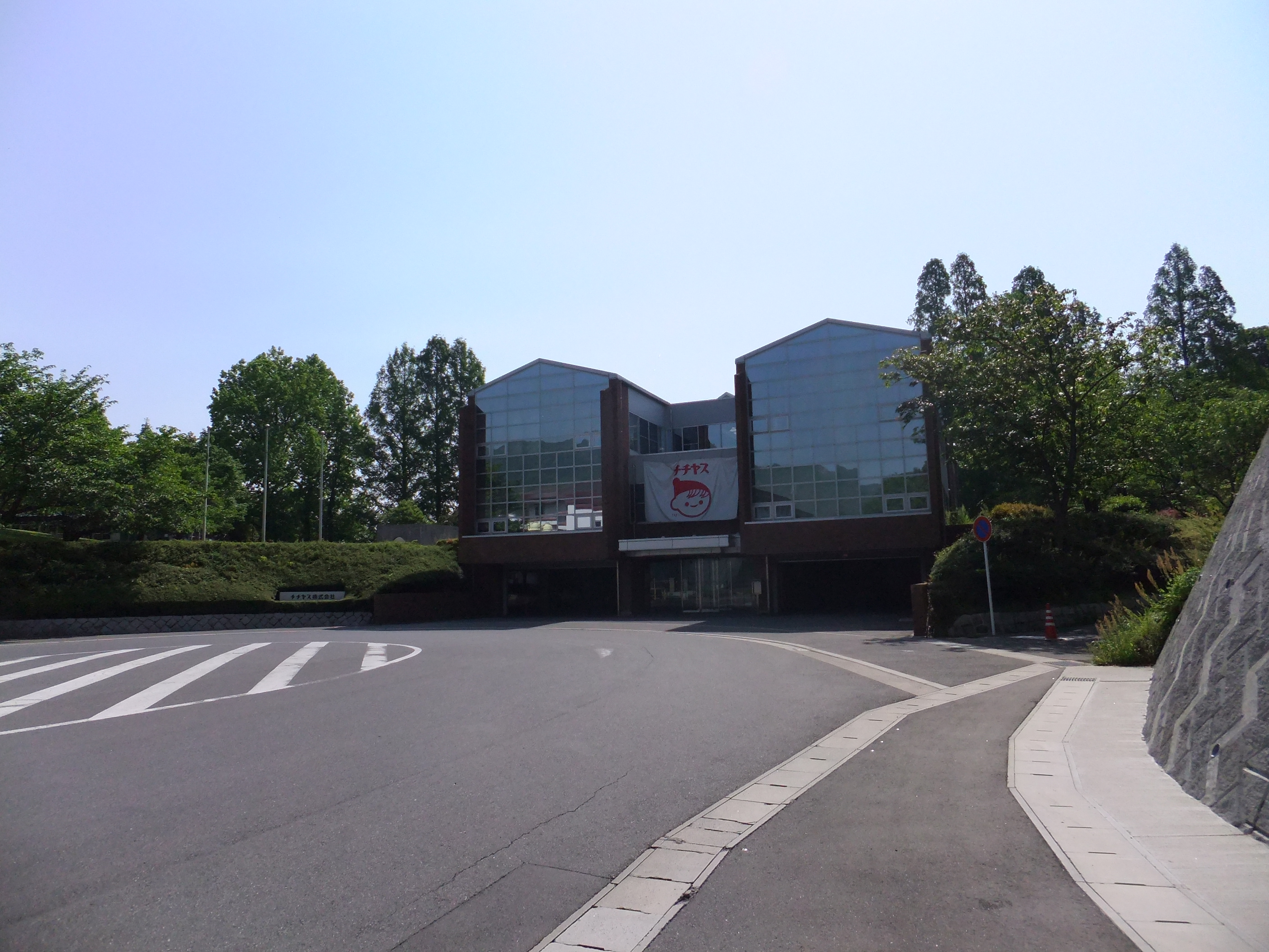 チチヤス本社